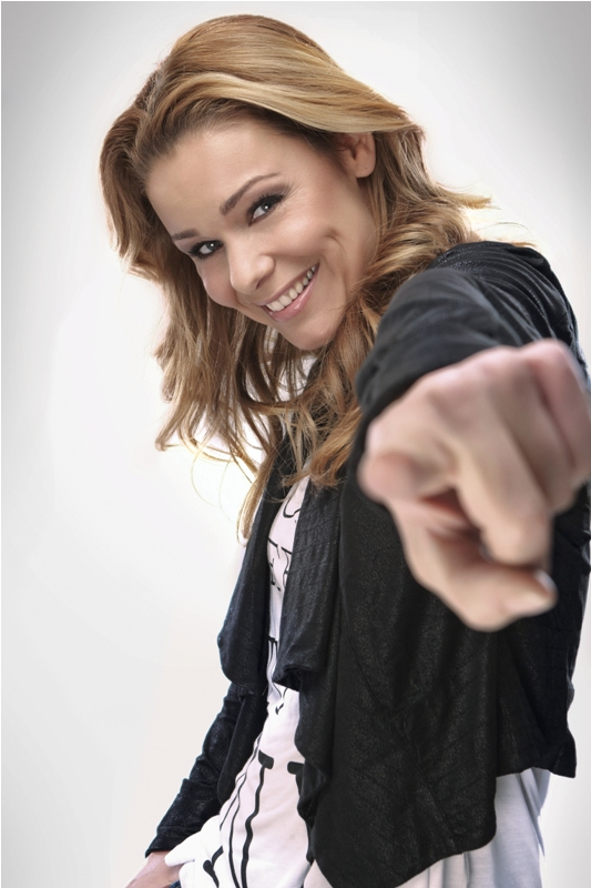 Froukje de Both (Amsterdam, 20 april 1972) is een Nederlands actrice, televisie- en radiopresentatrice en diskjockey.